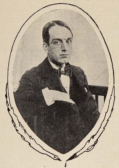 El escritor chileno Armando Donoso